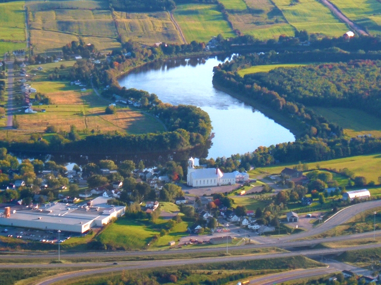 Français cadien: Vue aérienne de Scott